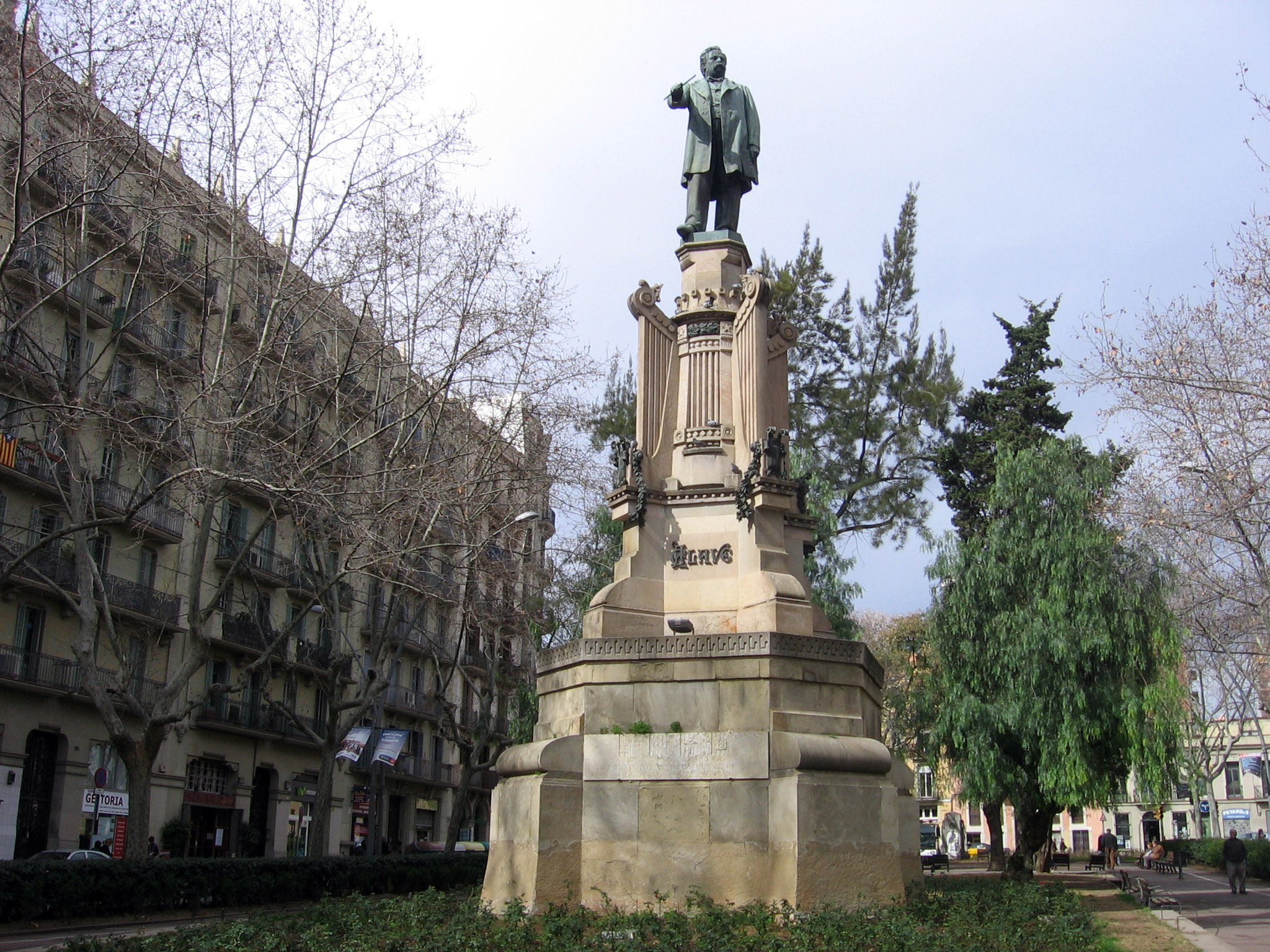 A Josep Anselm Clavé, Manuel Fuxà.